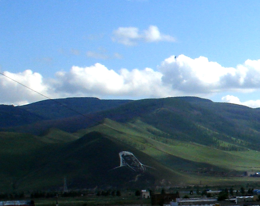 Chinggis Khan Drawing on Bogd Khan Uul